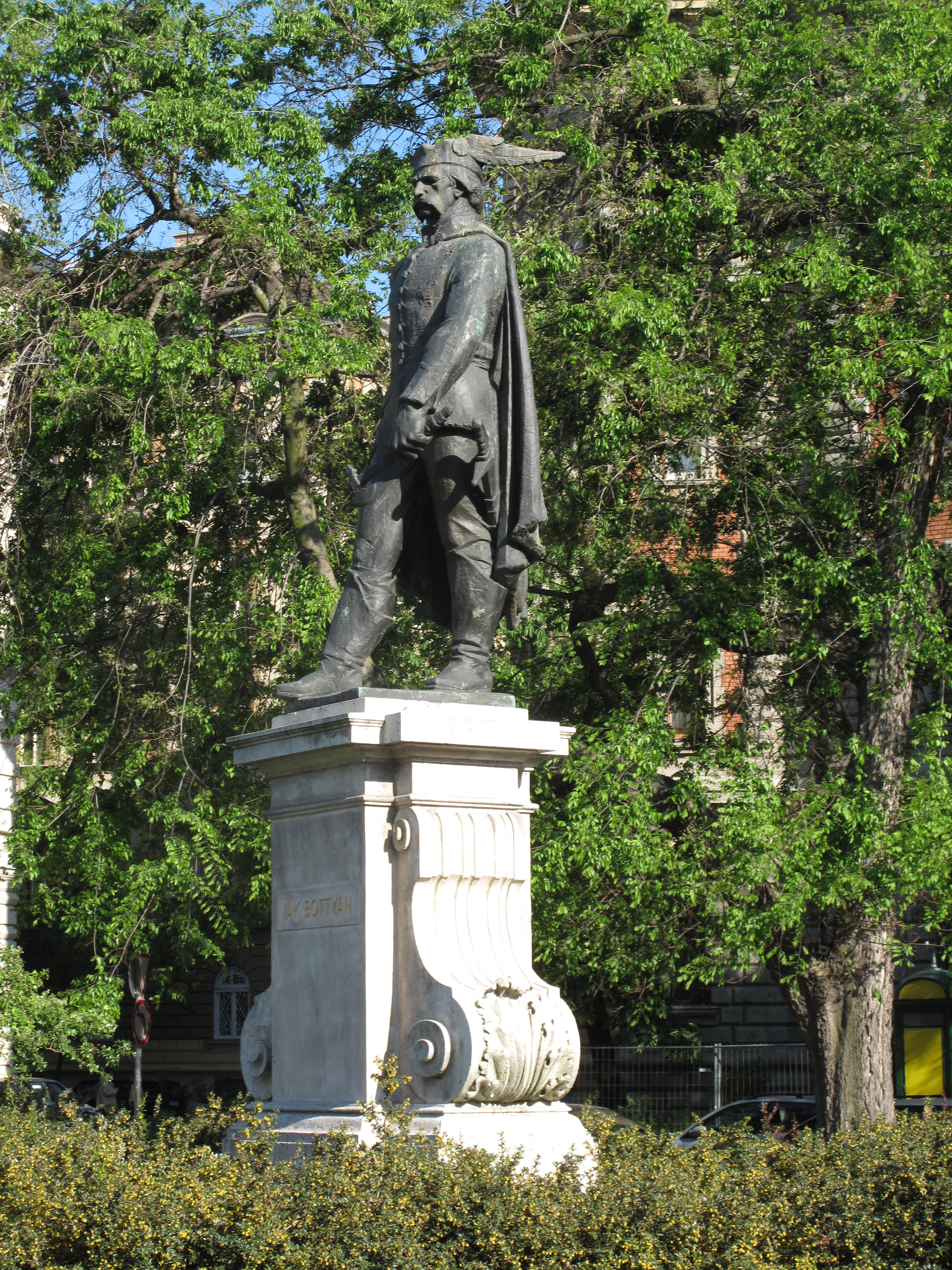 Budapešť